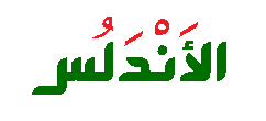 كلمة "الأندلس" باللونَيْن الأخضر والأحمر